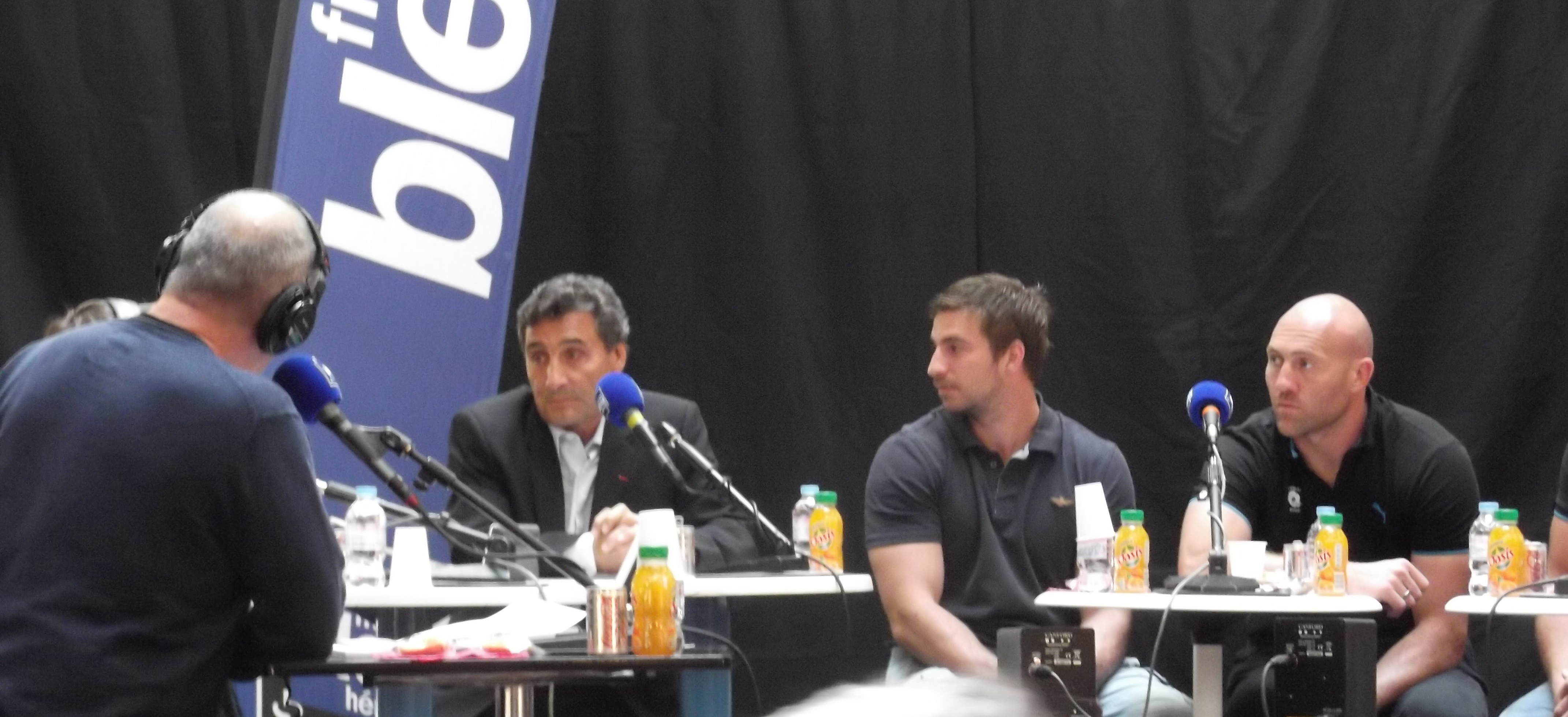 Enregistrement public de l'émission radio "club Sers" (France Bleu Hérault) avec les rugbymen du MHR et le président du club, Mohed Altrad.